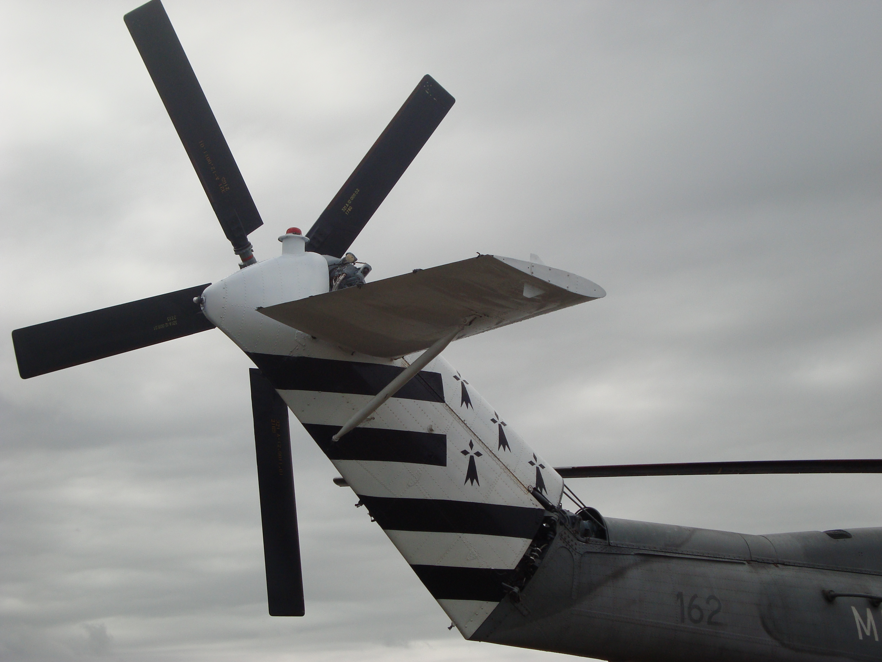 Super Frelon Flotille 32F Rotor Rotor Couleur Bretonne.JPG